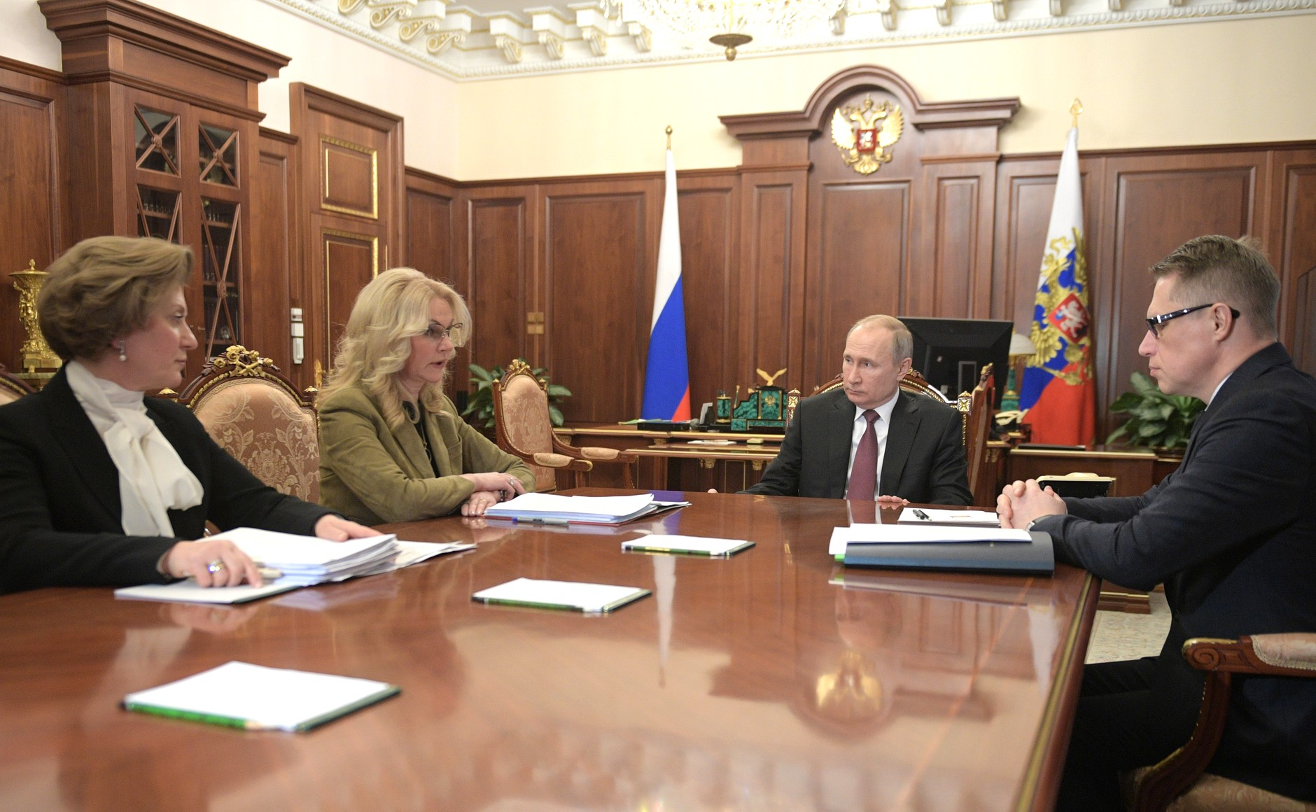 Совещание о мерах по борьбе с распространением коронавируса в России. Слева направо: Анна Юрьевна Попова, Татьяна Алексеевна Голикова, Владимир Владимирович Путин, Михаил Альбертович Мурашко.